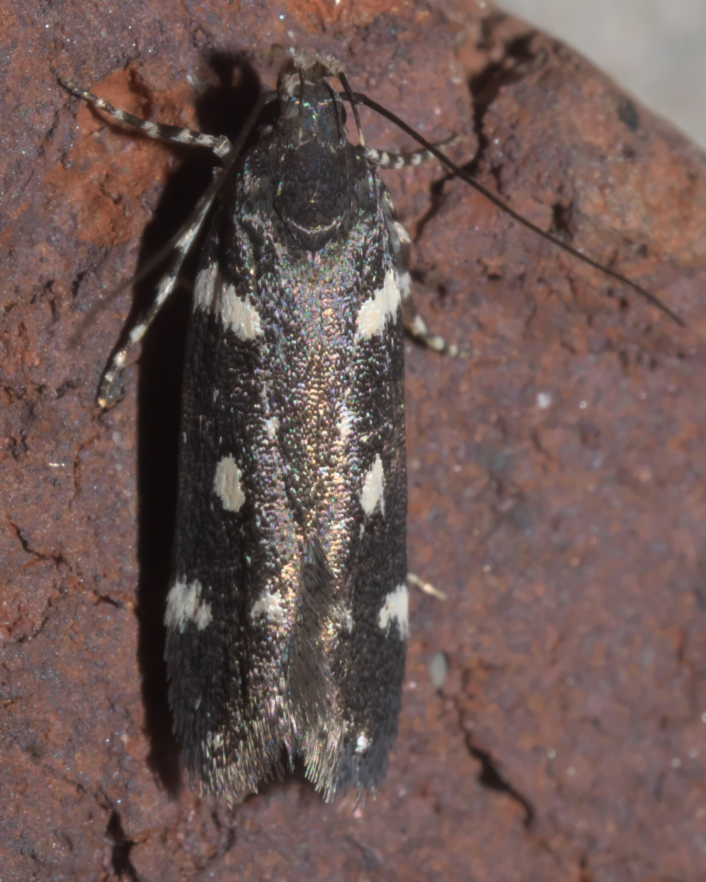 Aroga compositella, six-spotted aroga, Size: 9.2 mm, ID Confidence: 90